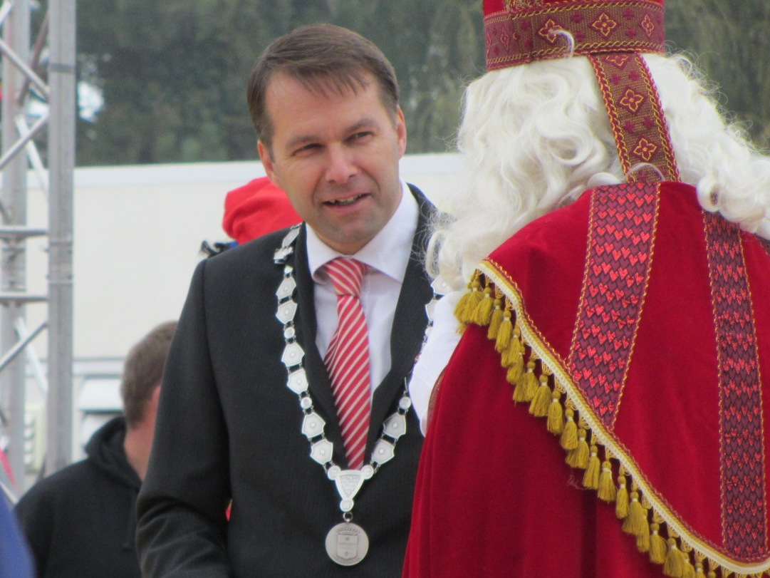 Ewald van Vliet, burgemeester